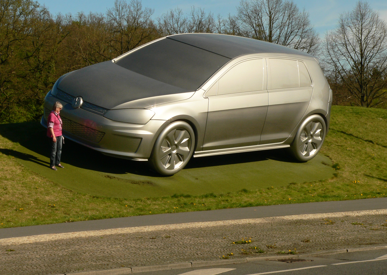 Golf-Skulptur von 2016 in Wolfsburg, am Stadtteil Rabenberg